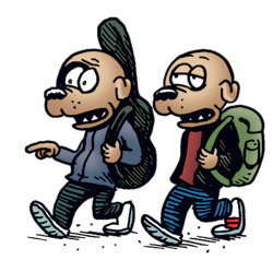 Utsnitt fra rocky 1376